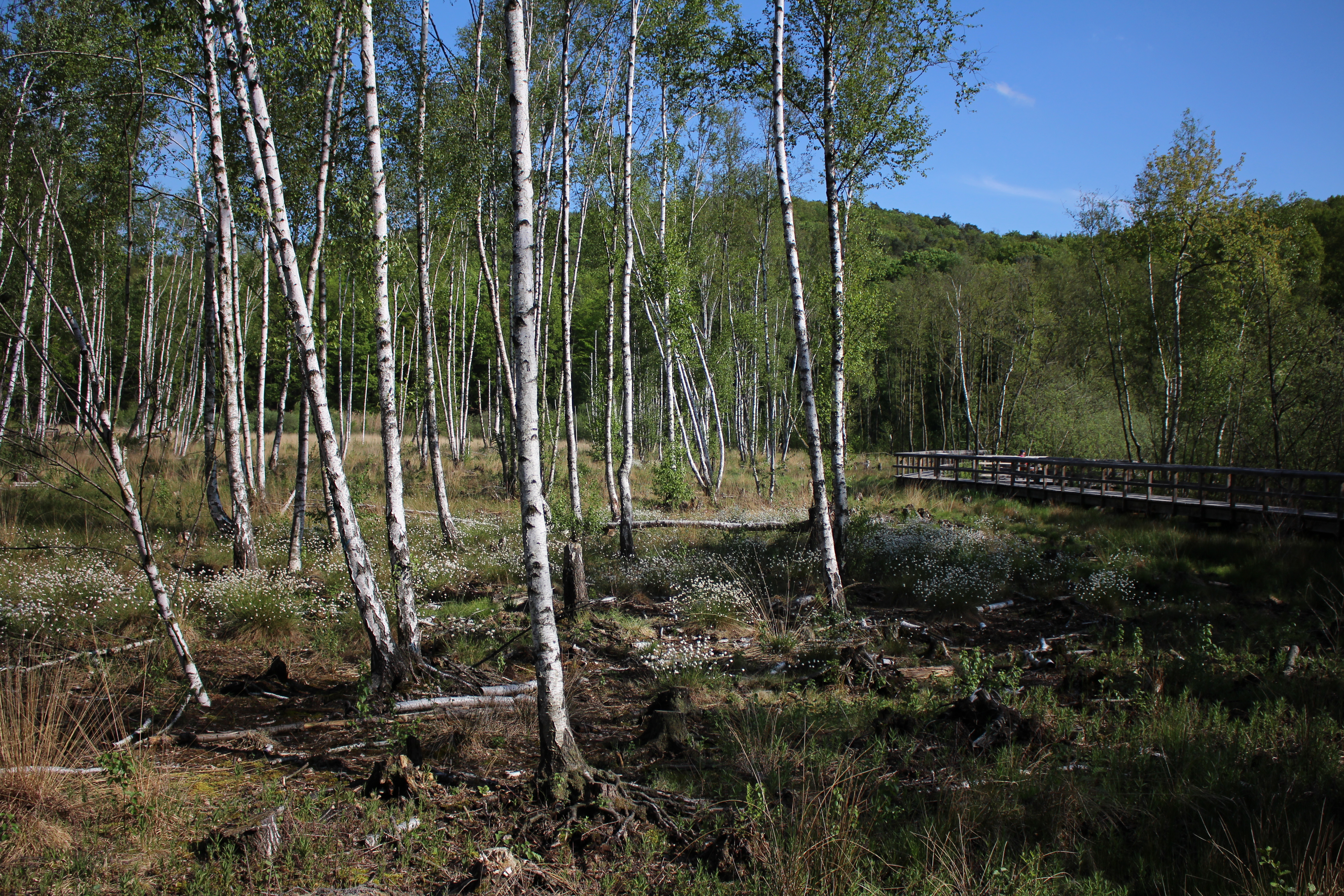 Im Mittelpunkt: Birken mit großen Wurzeln und weißen Blumen. Rechts: ein Steg mit Menschen und einer Sicht auf den Teufelssee. Im Hintergrund: die Müggelberge in Müggelheim.